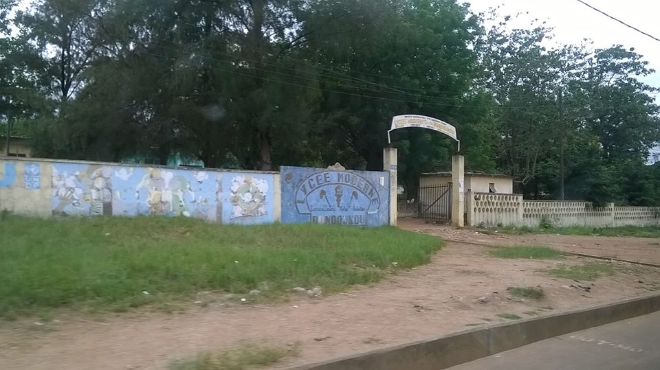 entrée